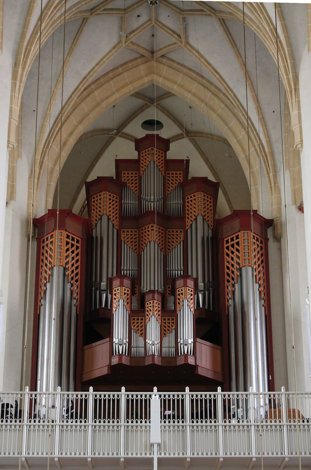 Hauptorgel der Frauenkirche in München (1994, G. Jann, IV/95)